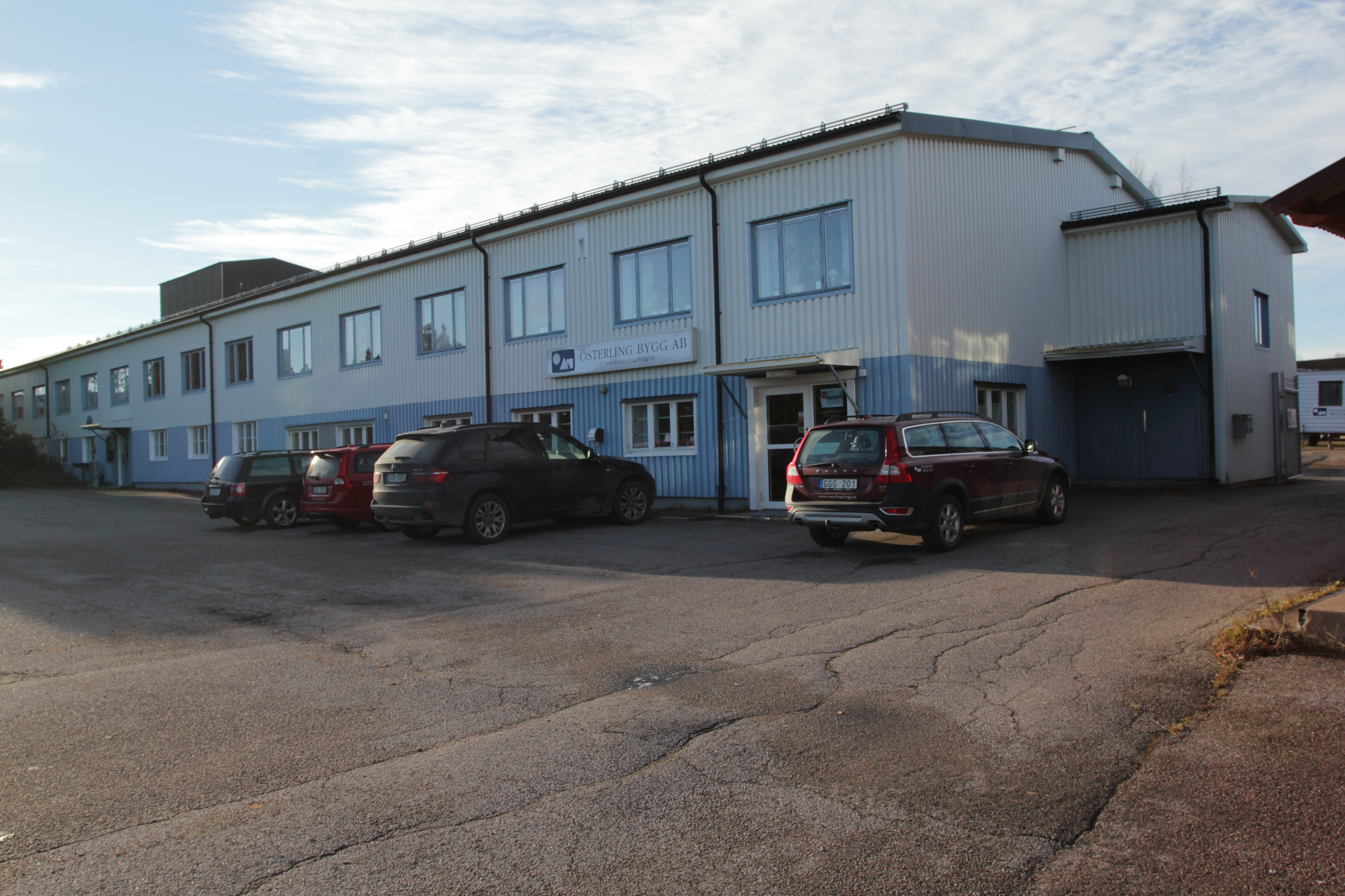 Kvarvarande byggnad av Alvar Aaltos möbel- och köksinredningsfabrik Artek (men med plåtfasad, ursprungligen puts). Numera Österling Bygg. I samma hus, men på motsatt sida, ligger dagverksamheterna "Ängen" och "Korpen". Hedemora, Sverige.